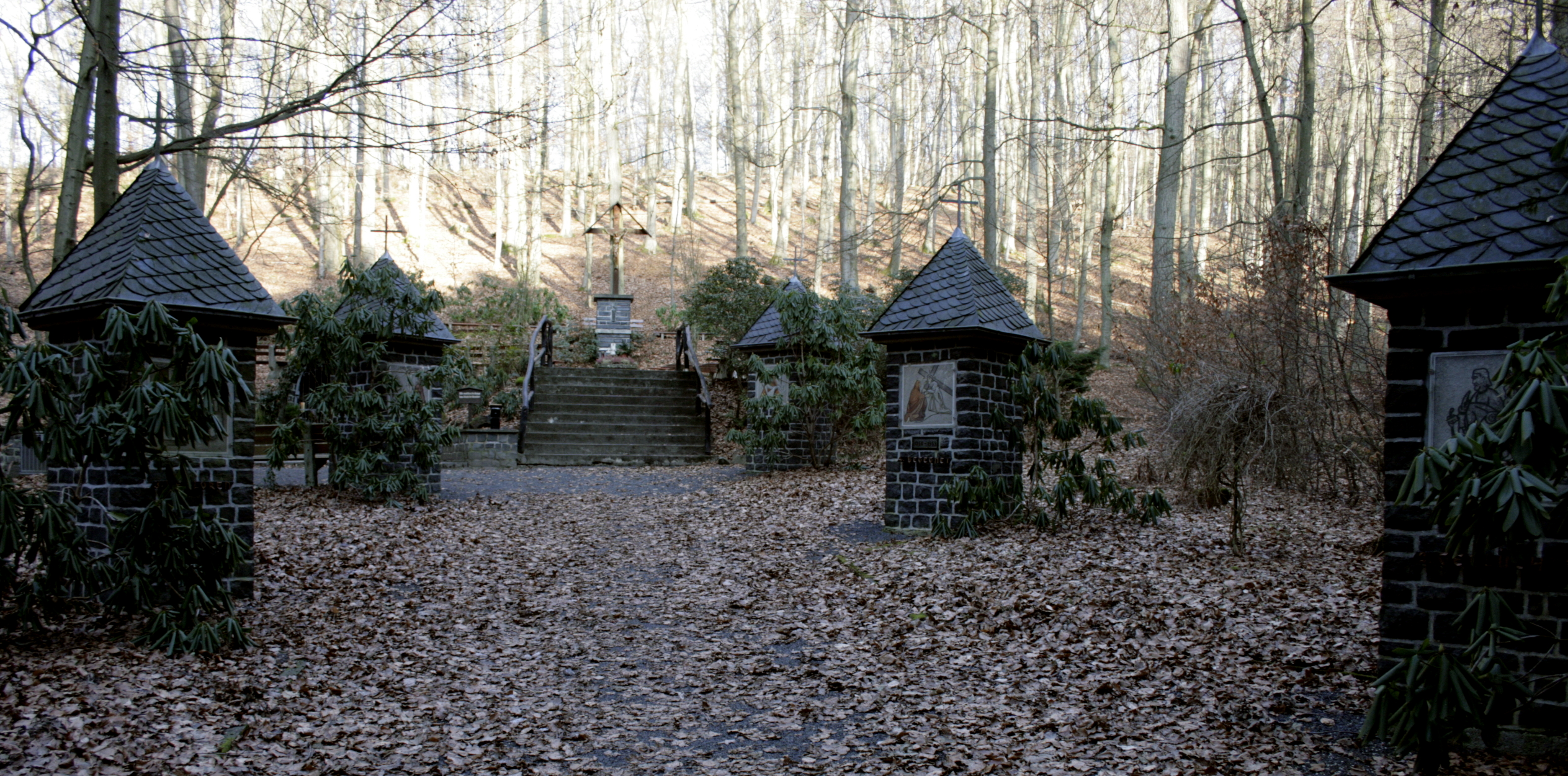 Wallfahrtsstätte "Sieben Schmerzen - Sieben Wunden" in Hadamar-Oberzeuzheim, Deutschland